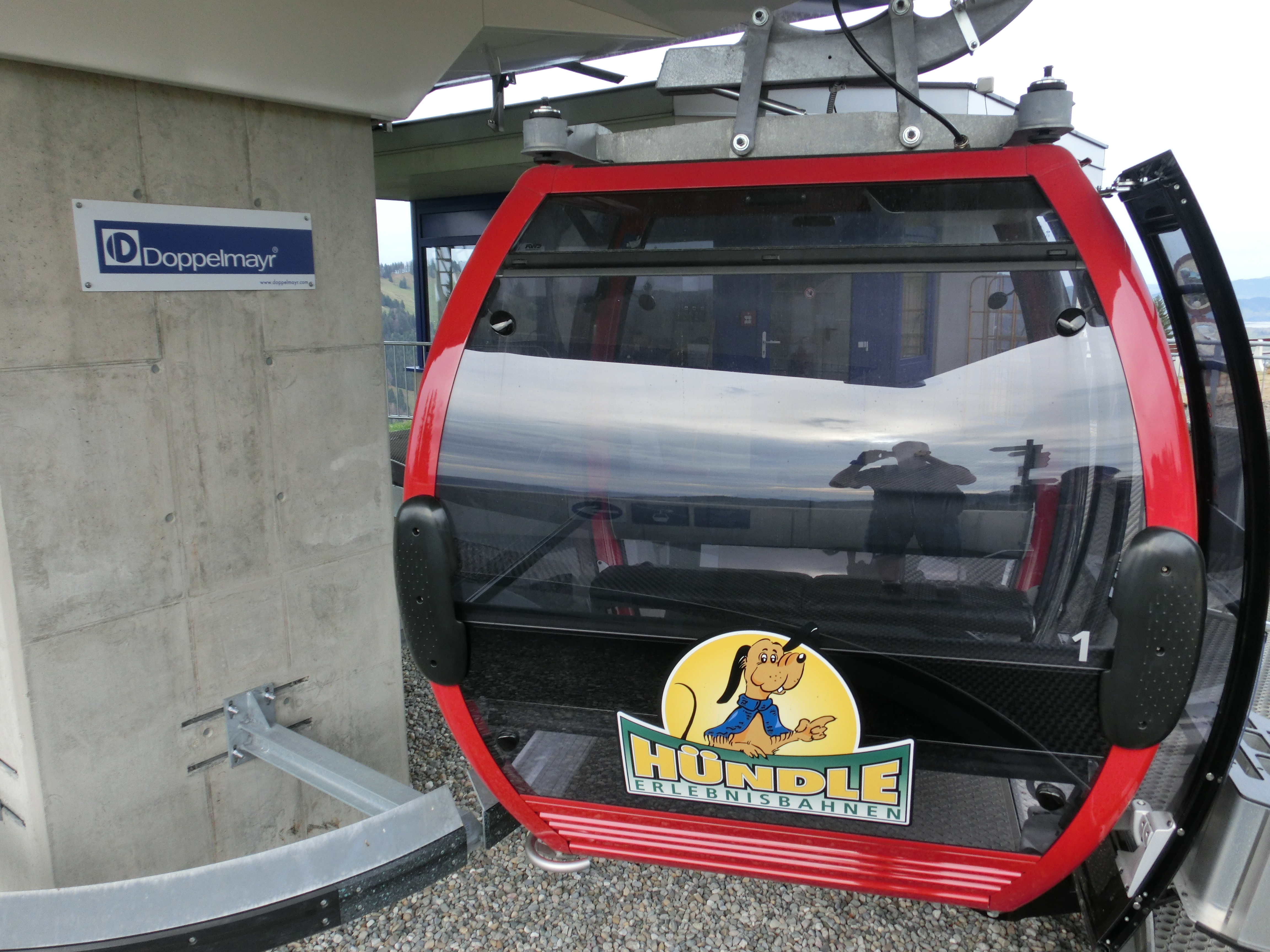 Deutschland - Bayern - Landkreis Oberallgäu - Oberstaufen: Hündlebahn, Gondel an der Bergstation